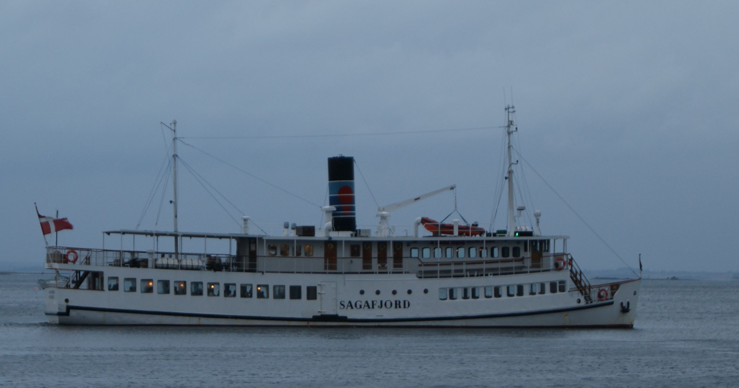 M/S Sagafjord på Roskilde Fjord